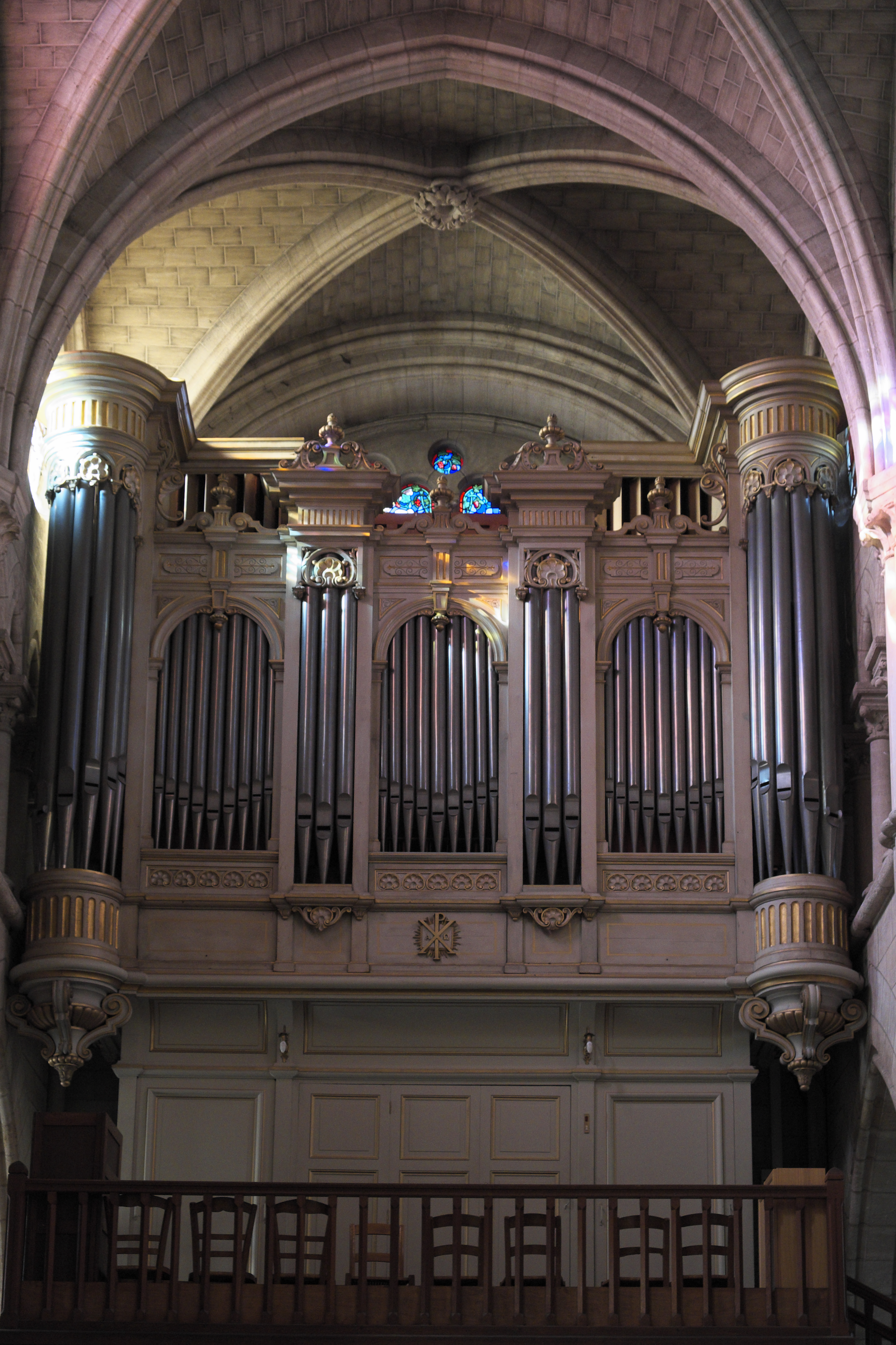 Katholische Pfarrkirche Notre-Dame in Bougival im Département Yvelines (Île-de-France/Frankreich), Orgel